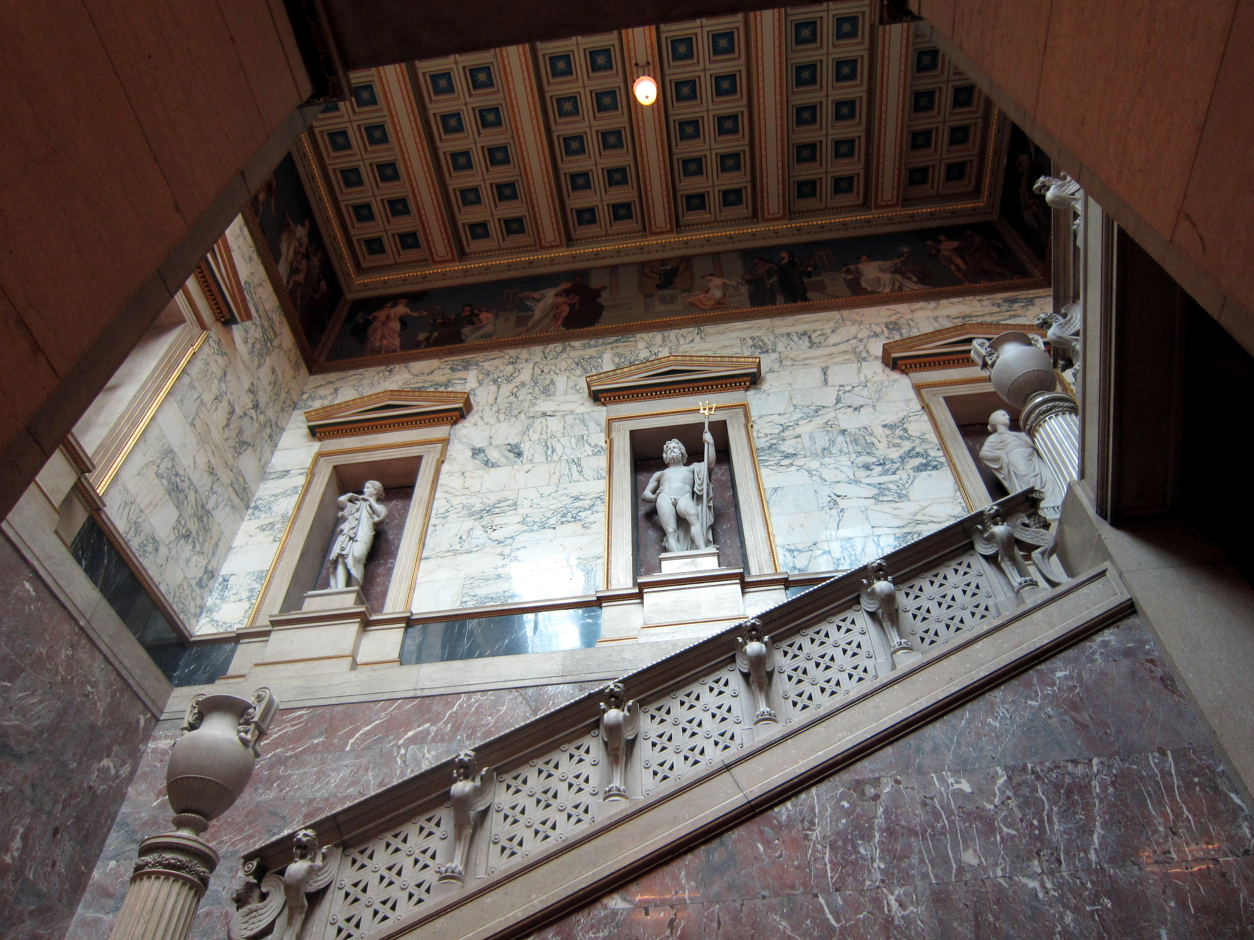 Parlamentsgebäude